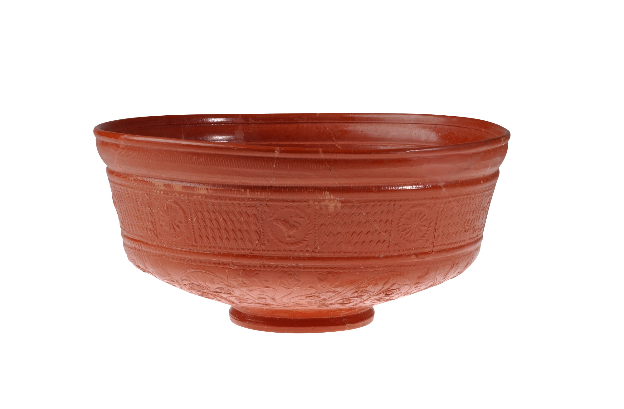 Kom in terra sigillata met reliëfversiering, 50 tot 85 NC, vindplaats: Tongeren, Kielenstraat, 1992, houtlemen ambachtswijk, kuil, collectie Gallo-Romeins Museum Tongeren, TO92/017/921